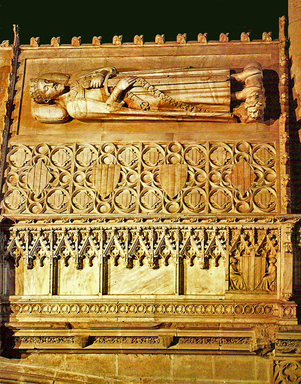 Sepulcre del segle XIV de Jaume I d'Aragó al Reial Monestir de Santa Maria de Poblet